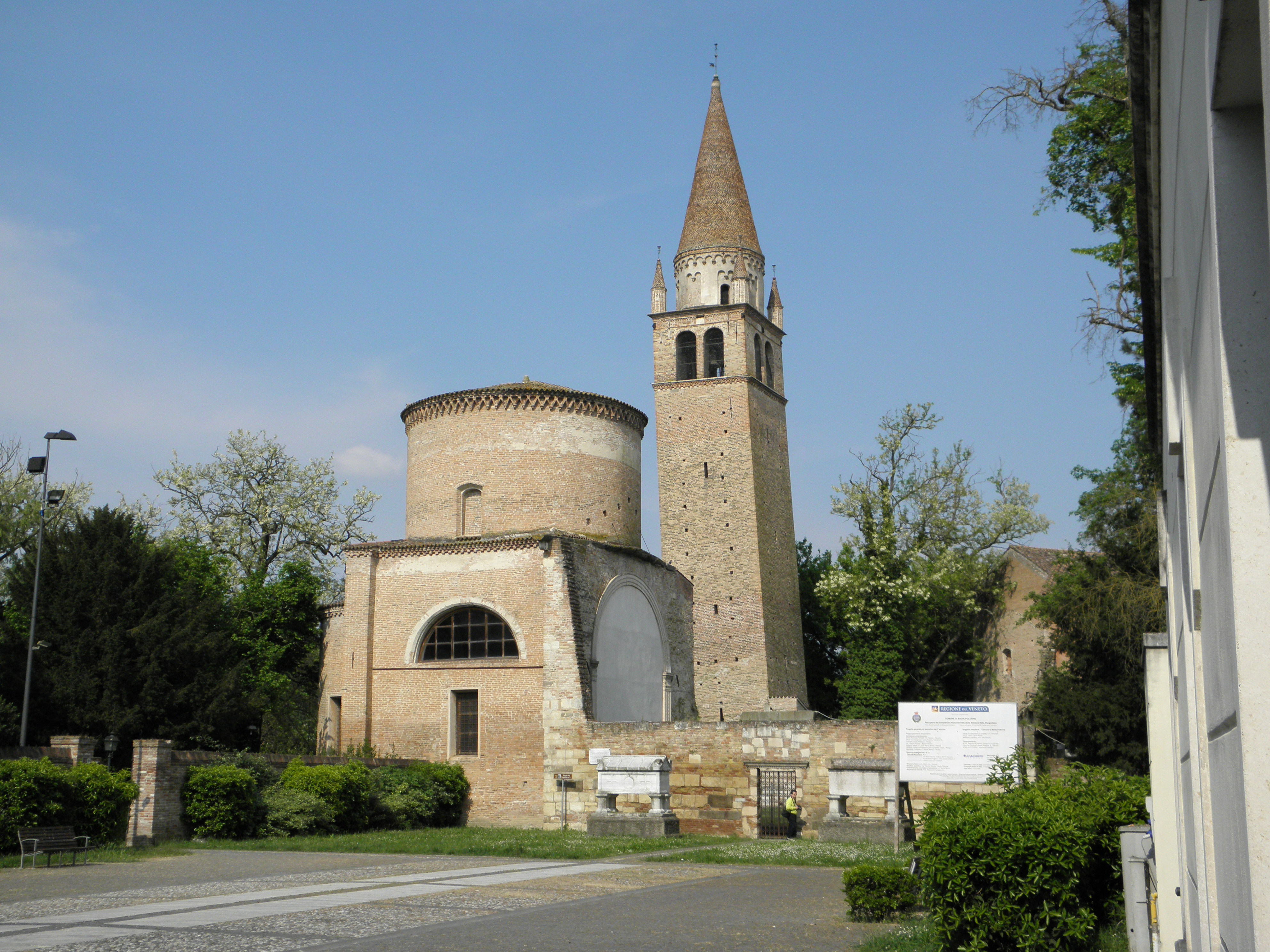 Badia Polesine: vista di quanto resta del complesso dell'abbazia della Vangadizza dal piazzale di via degli Estensi.